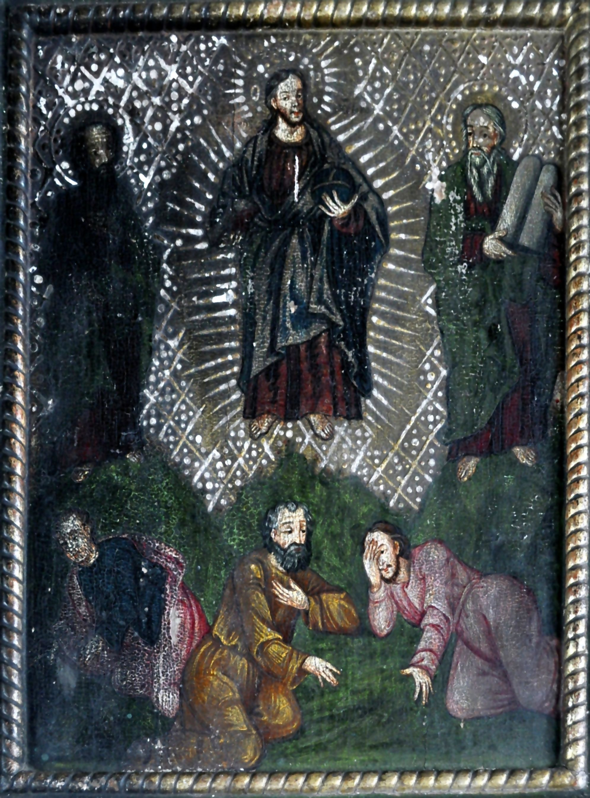 Biserica din Mănăstireni, județul Cluj (icoanele de patrimoniu)